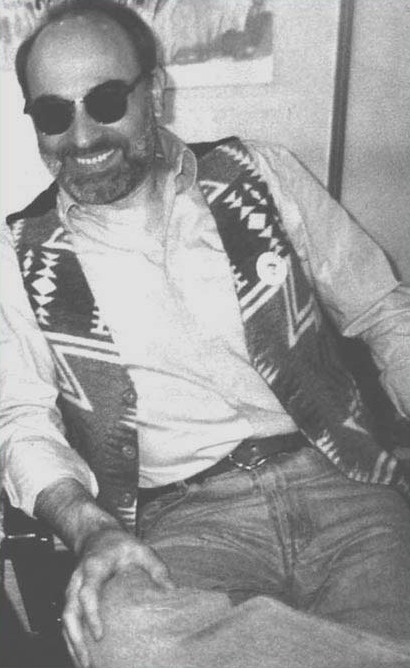 Giancarlo Berardi, scrittore, autore del fumetto Ken Parker. Foto di Joe Zattere (Fumetti d'Italia)